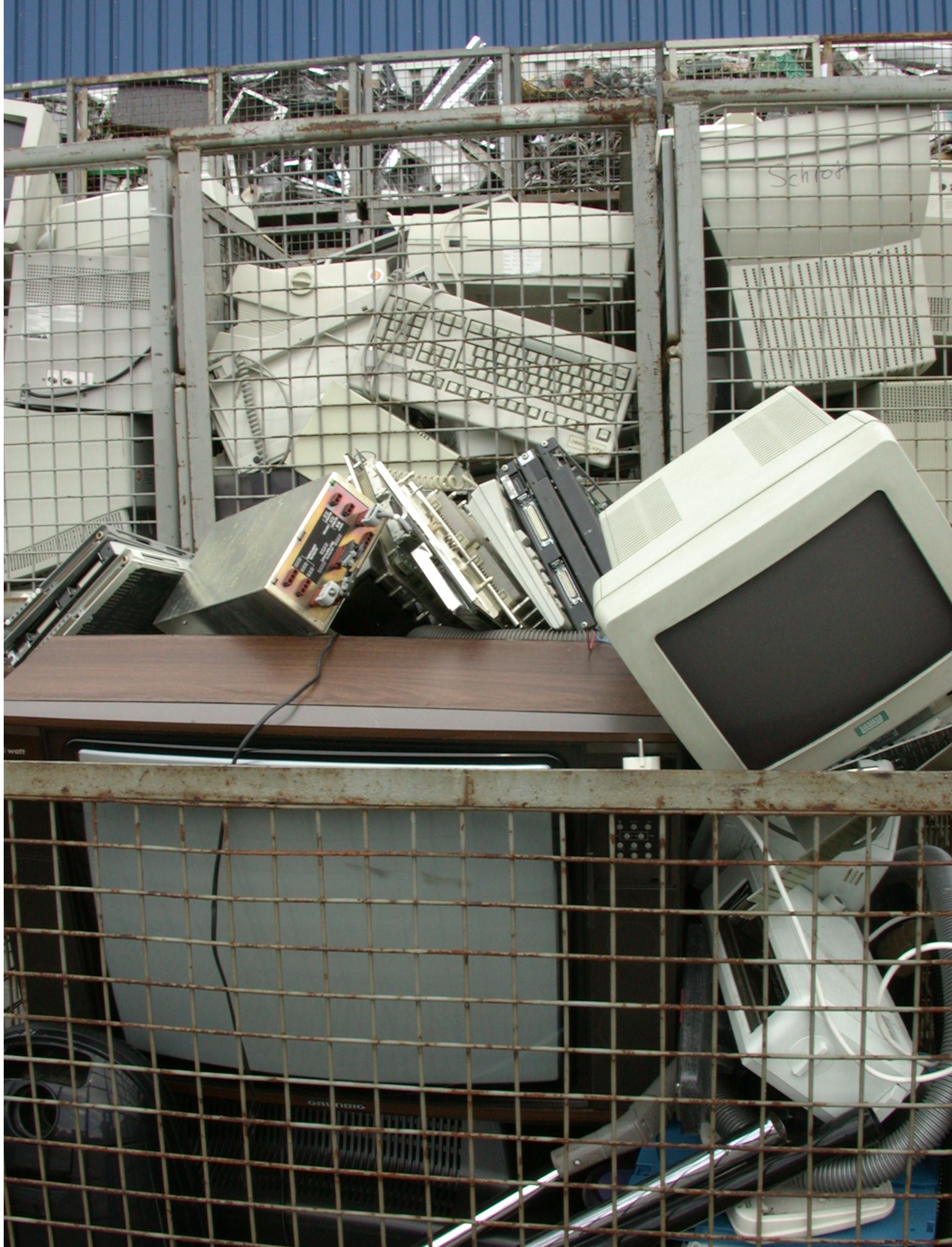 Elektronikschrott in einer Recyclingsfirma in Goslar, Deutschland